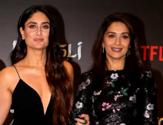 Freida Pinto, Kareena Kapoor Khan dan Madhuri Dixit di konferensi pers untuk Mowgli pada 2018